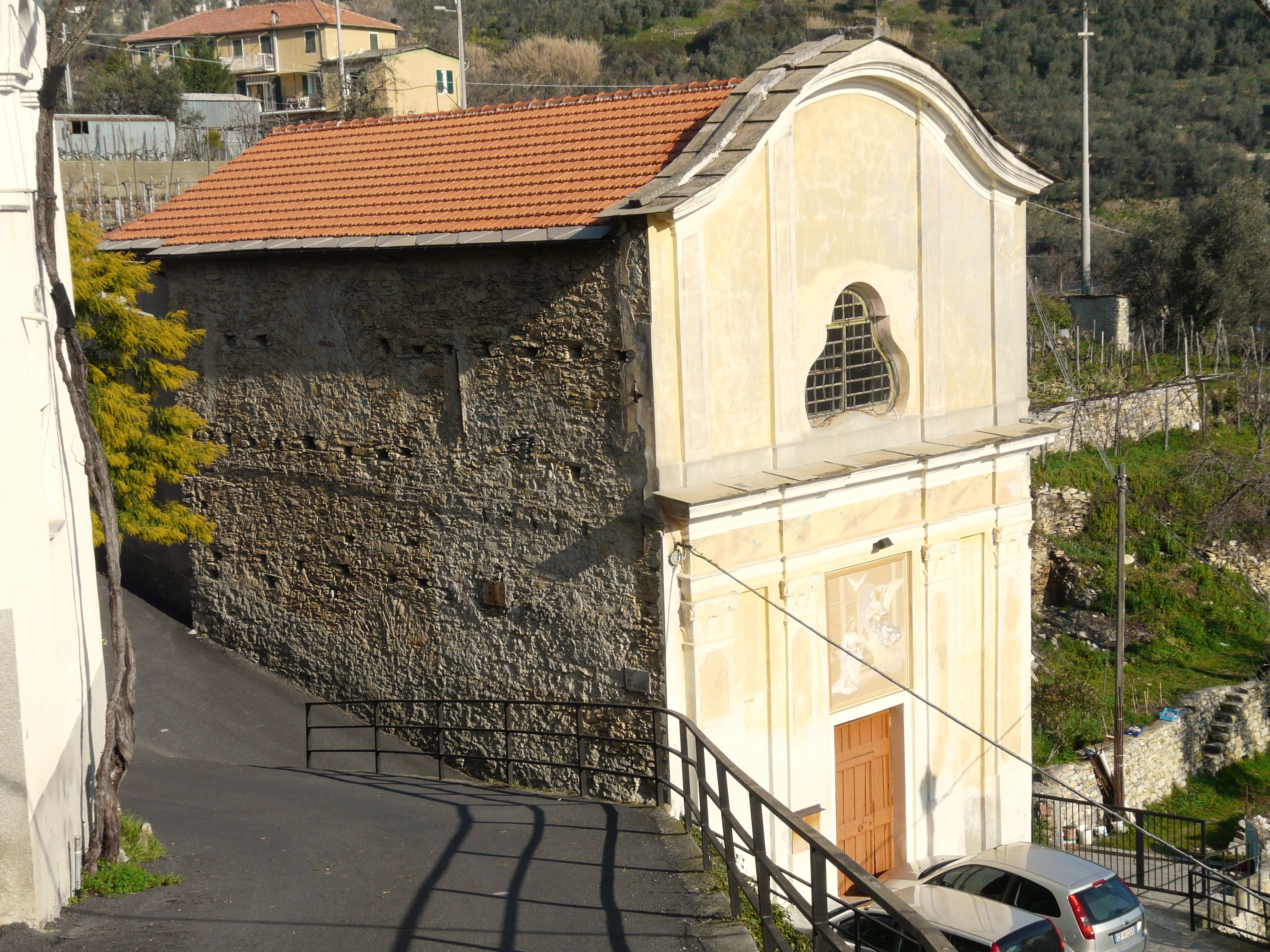 Oratorio di Caravonica, Liguria, Italia